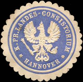 Sealing stamp Title: Königlich Preussische Landes - Consistorium - Hannover Description: blau, weiß, geprägt Place: Hannover size: 3 cm